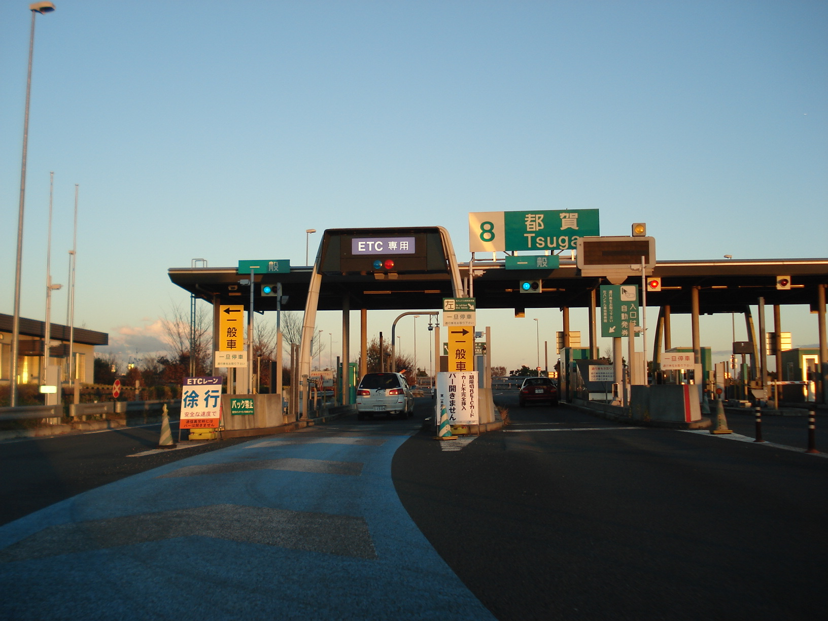 北関東自動車道 都賀インターチェンジ 料金所